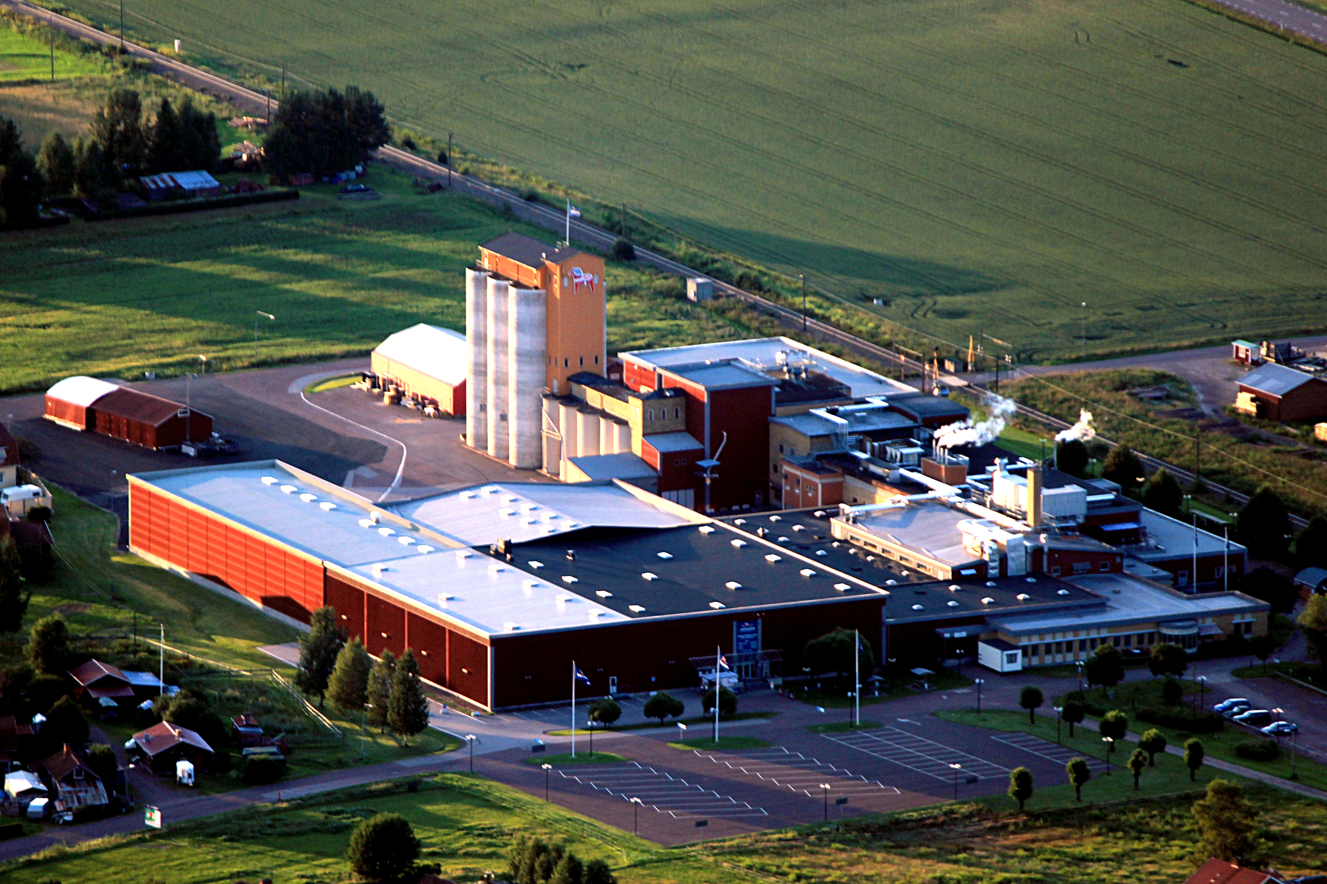 Flygfoto över Leksands kommun, Dalarnas län, Sverige This aerial photograph has been approved for publishing by the Swedish Armed Forces with the ID: FMTM 10 830:11043 This tag does not indicate the copyright status of the attached work. A normal copyright tag is still required. See Commons:Licensing for more information. English | svenska | +/−